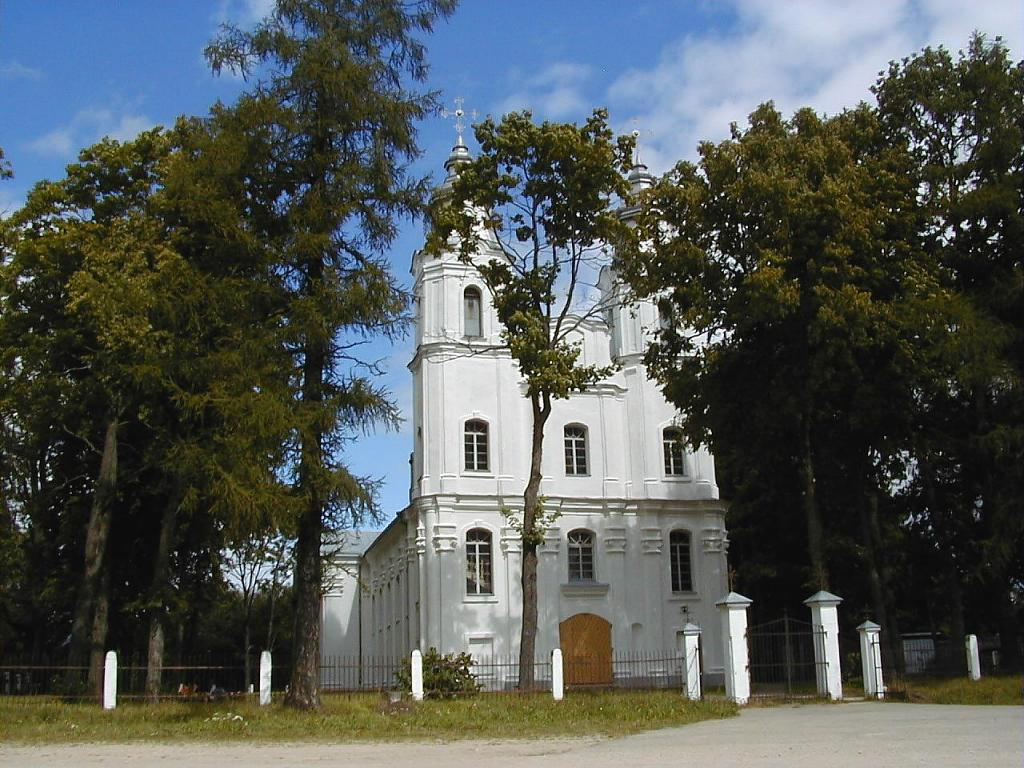 Bērzgales baznīca 2001-08-12